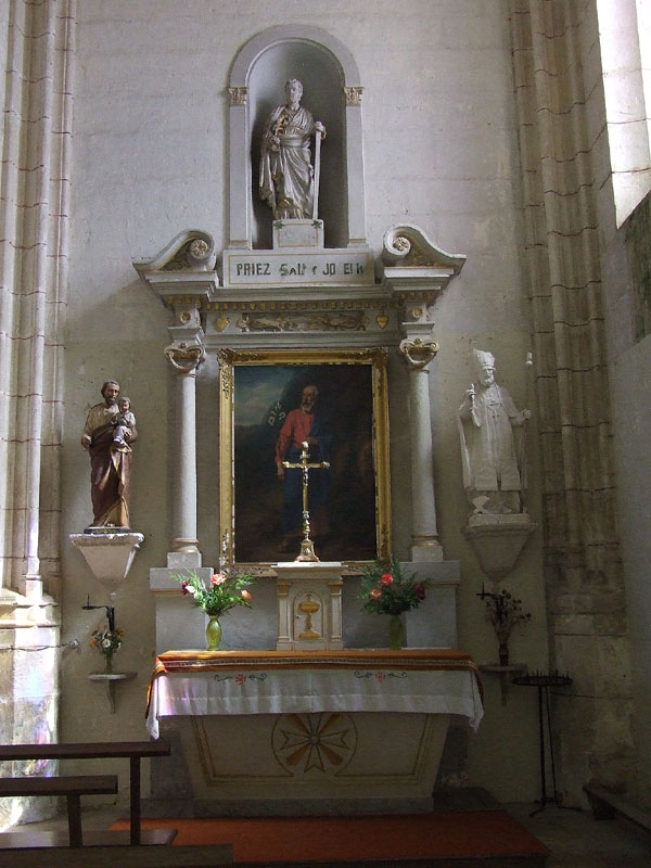 Autel sud de l'église d'Étais-la-Sauvin (Yonne) dédié à saint Joseph